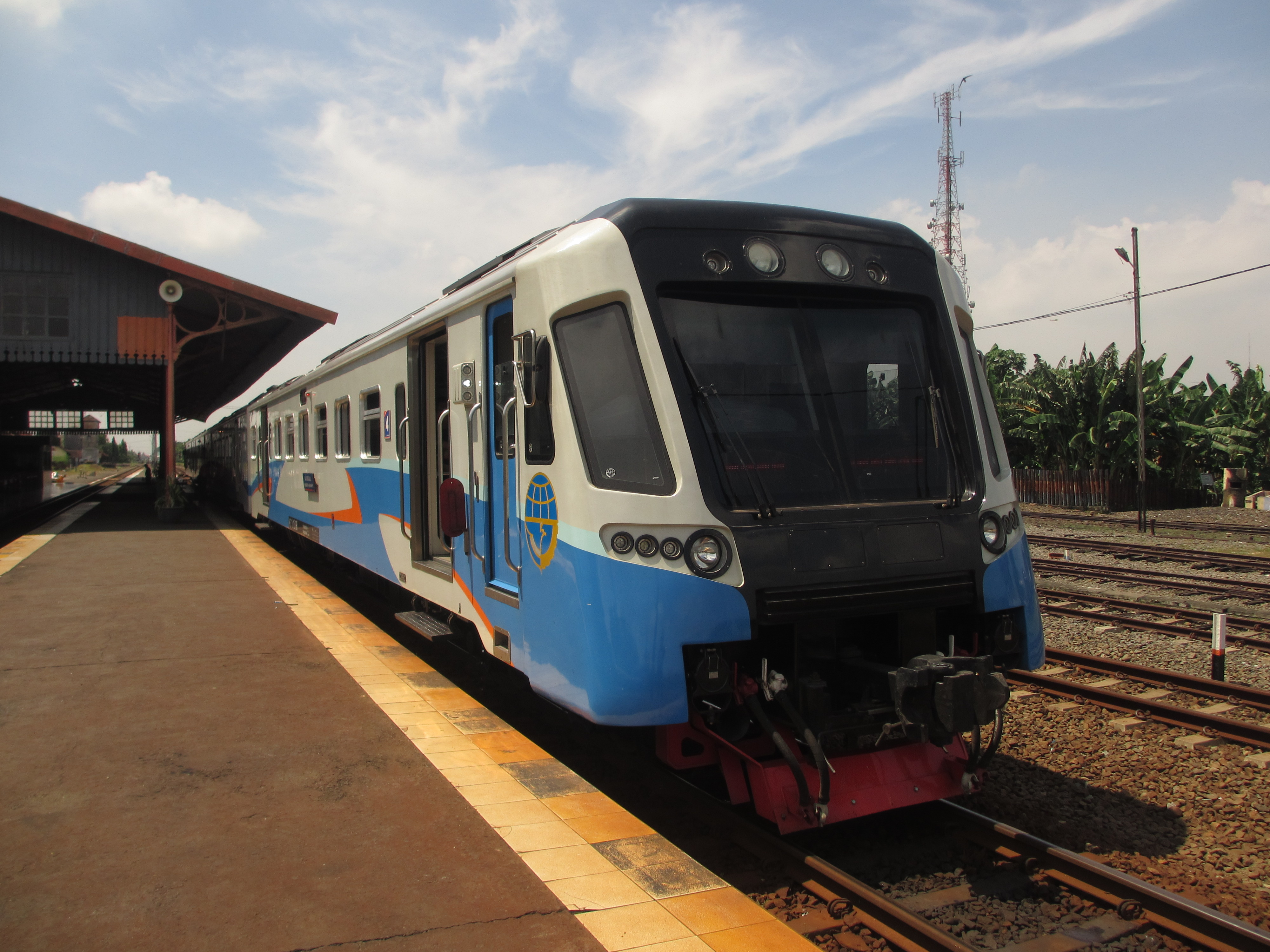 Kereta api Jenggala di Stasiun Mojokerto.